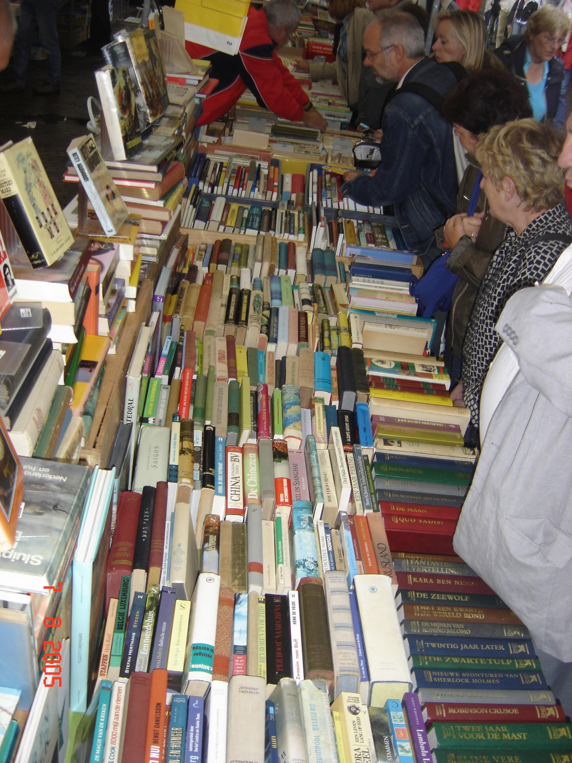 Boeken op de markt in Deventer.